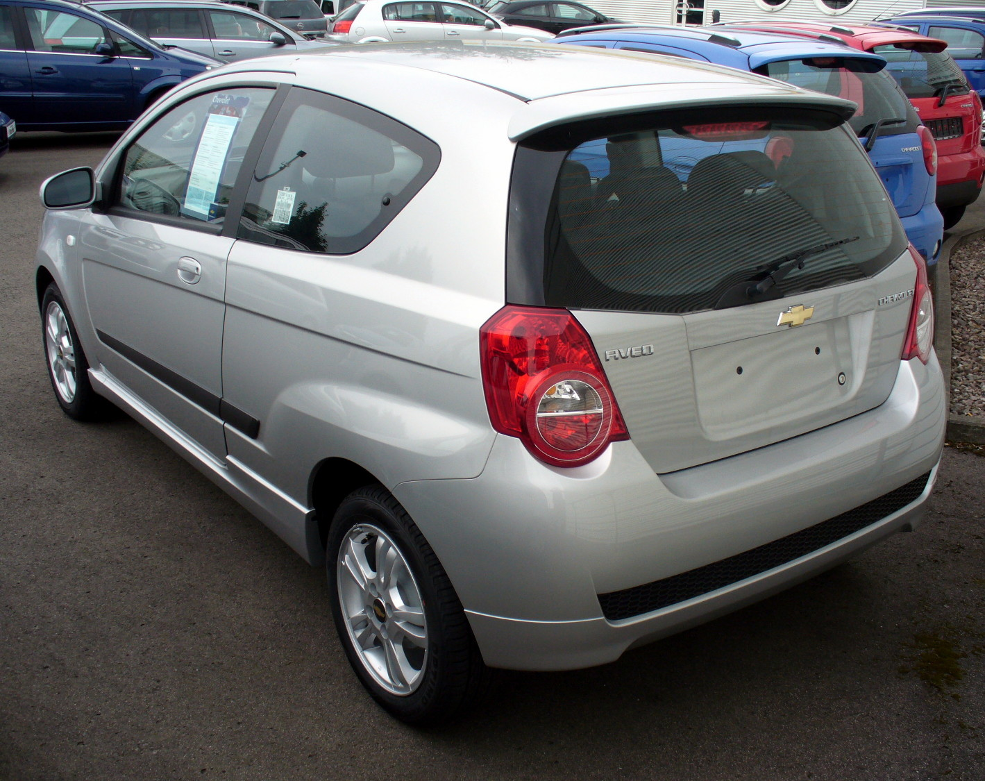 Chevrolet Aveo Dreitürer